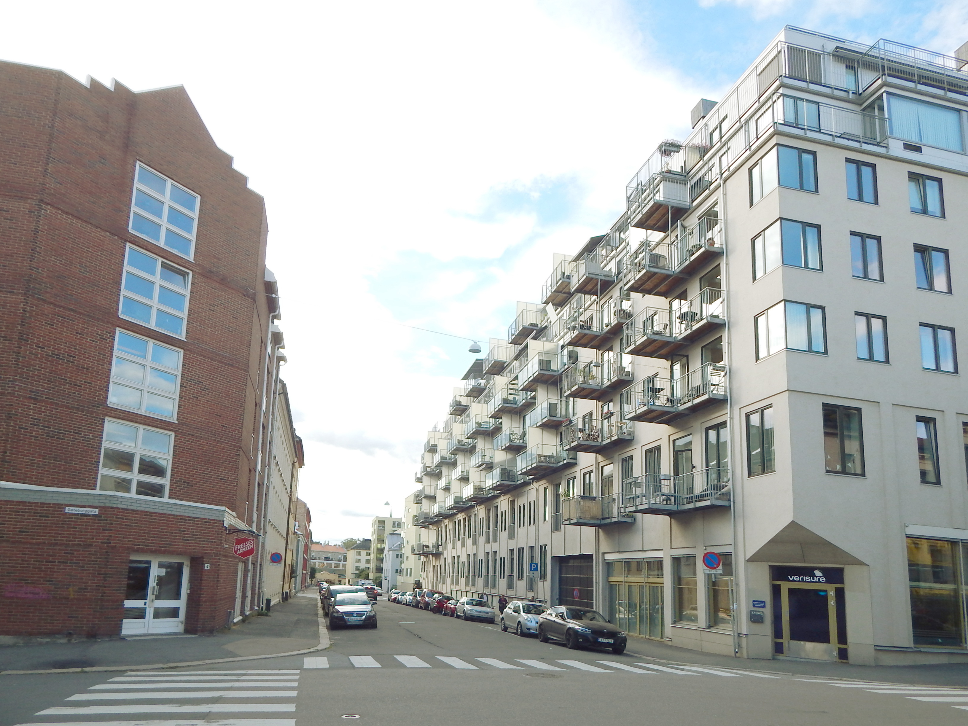 Karlstadgata, krysset ved Gøteborggata. Til høyre er Teglverksgata 7C, til venstre Gøteborggata 4B.